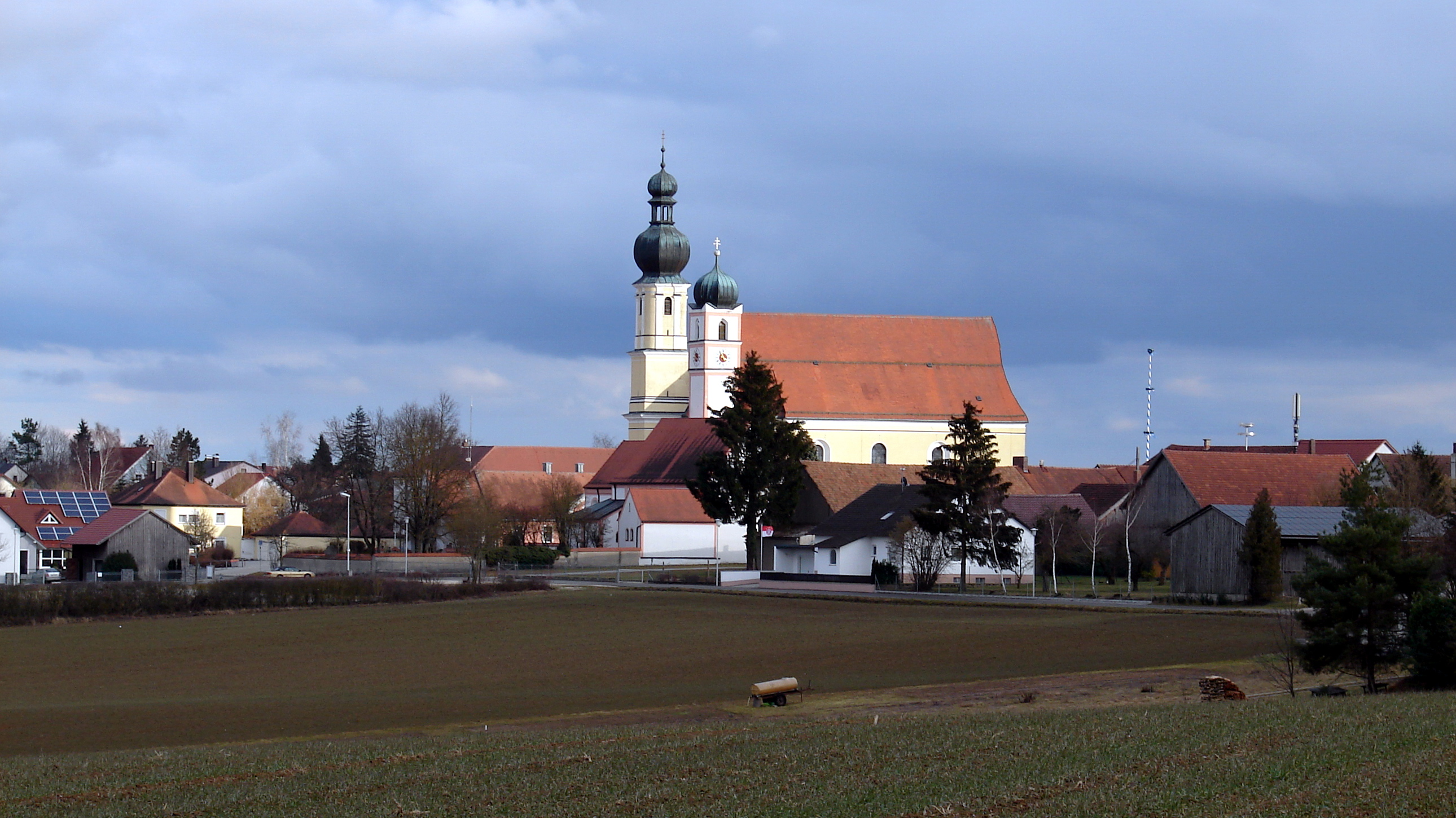 Die Wallfahrtskirche Maria Schnee ist eine Rokokokirche in Aufhausen.